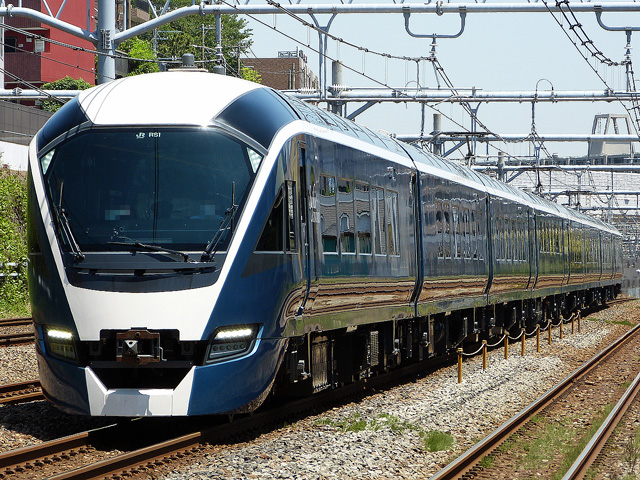 東日本旅客鉄道E261系車両。川崎～横浜間（新子安）にて。 Panasonic Lumix DMC-FZ150